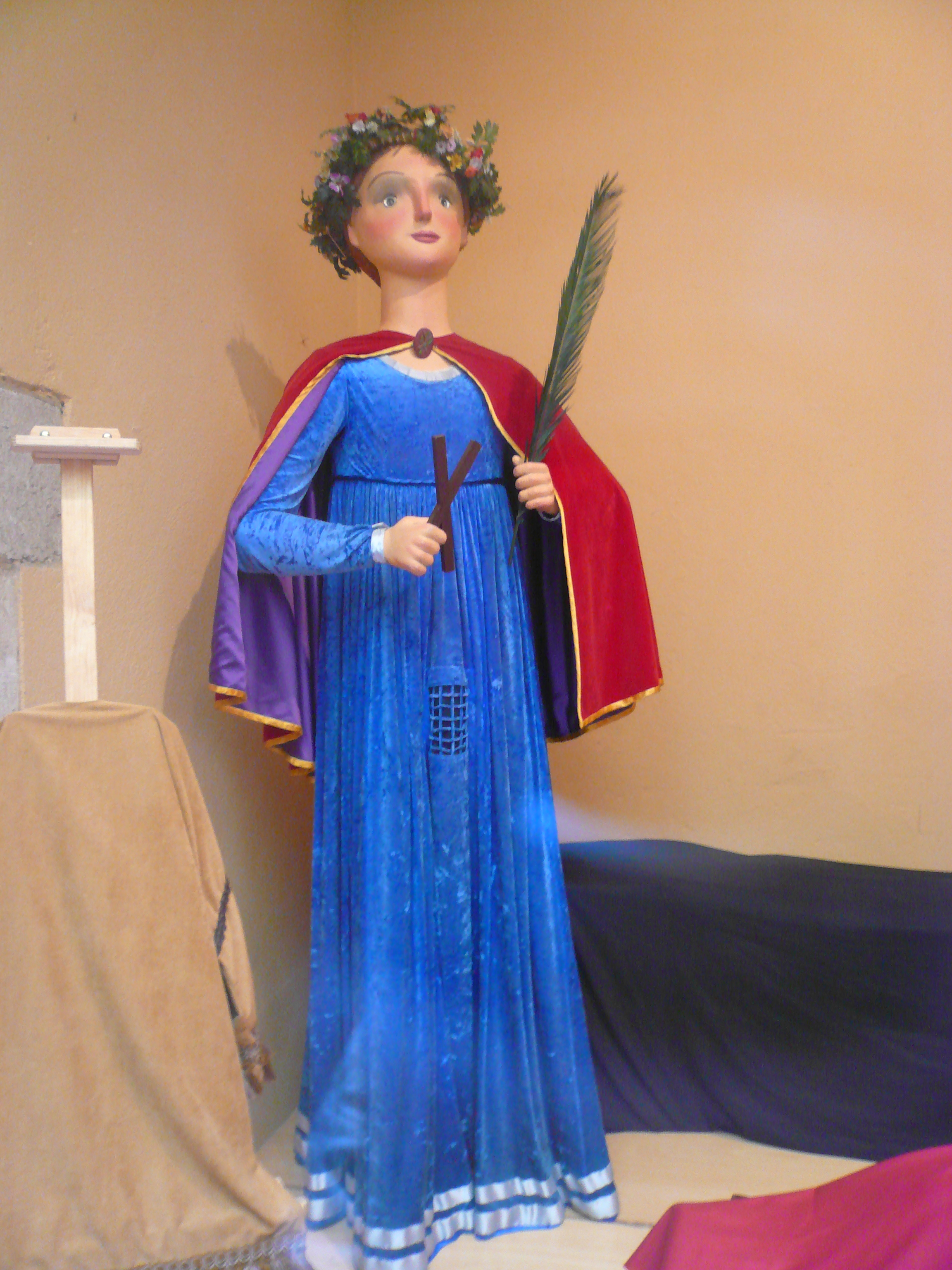 Palau de la Virreina (Barcelona) Object location41° 22′ 57″ N, 2° 10′ 18.01″ E